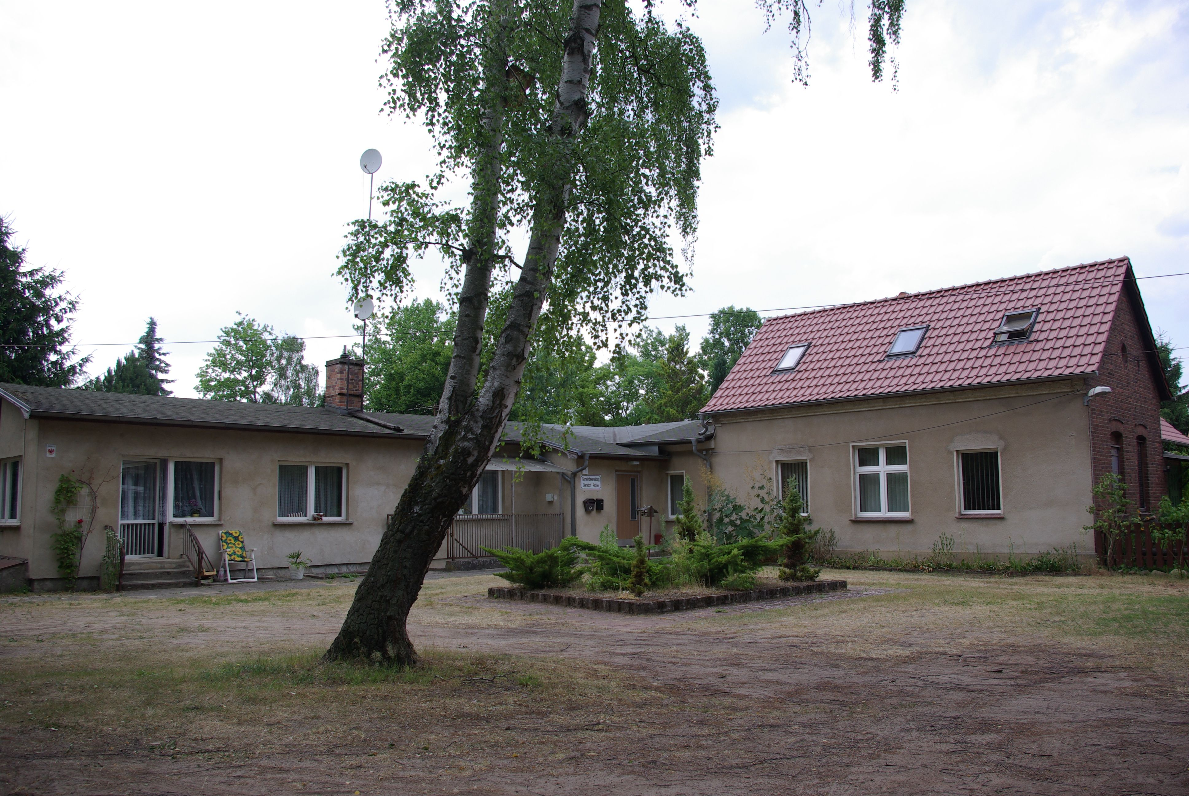 Diensdorf-Radlow in Brandenburg. Das Bild zeigt die Gemeindeverwaltung des Ortes. Der Ort gehört ansonsten dem Amt Scharmützelsee an.